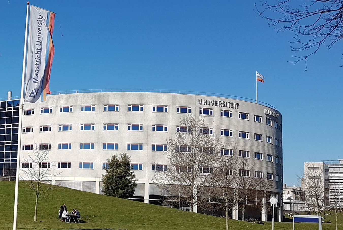 Zicht uit het zuidoosten op de Universiteitssingel met gebouwen van het Maastrichts Universitair Medisch Centrum Plus (MUMC+), het vroegere academisch ziekenhuis en de medische faculteit van de Universiteit Maastricht.